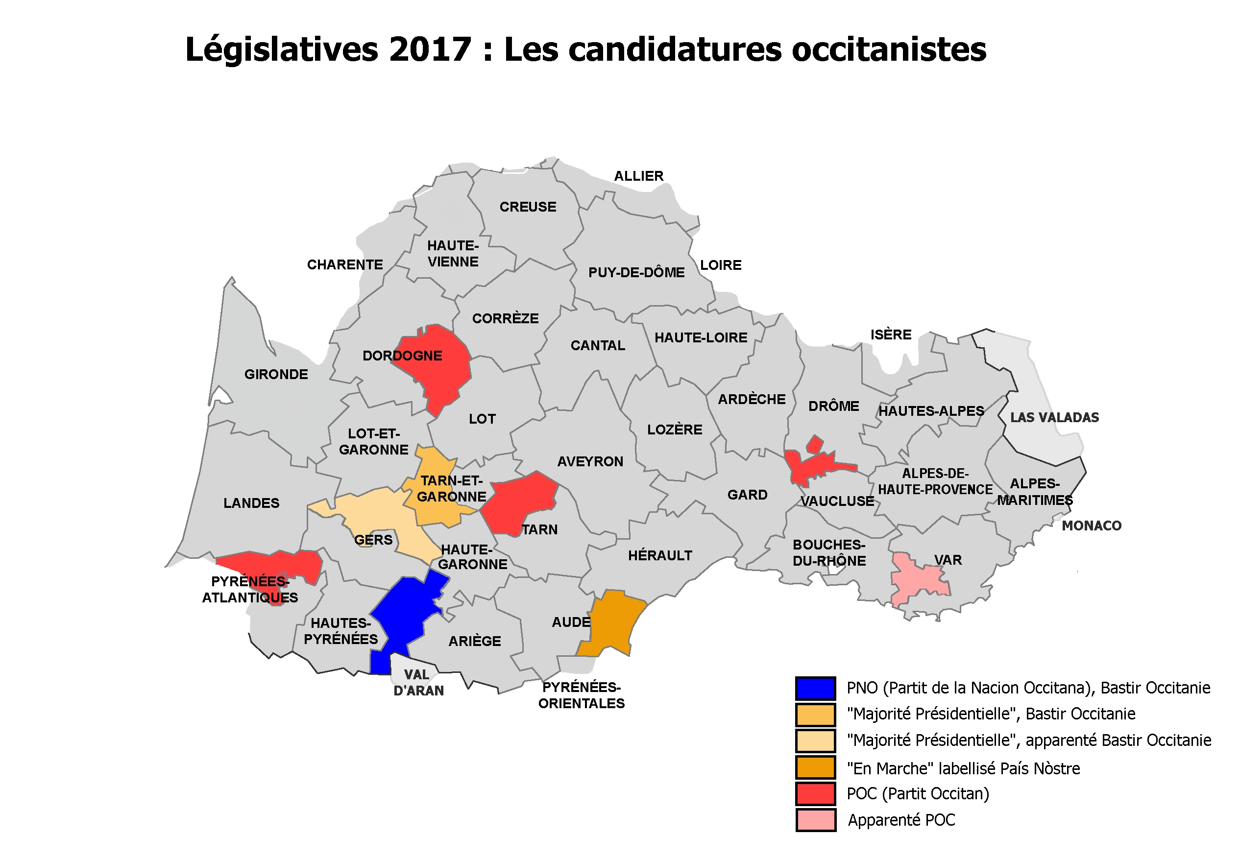 Carte des candidatures soutenues en Occitanie par un mouvement occitaniste (Bastir Occitanie, Parti de la Nation Occitane, Parti Occitan, País Nòstre) aux élections législatives de 2017